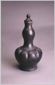 Labu Sayong